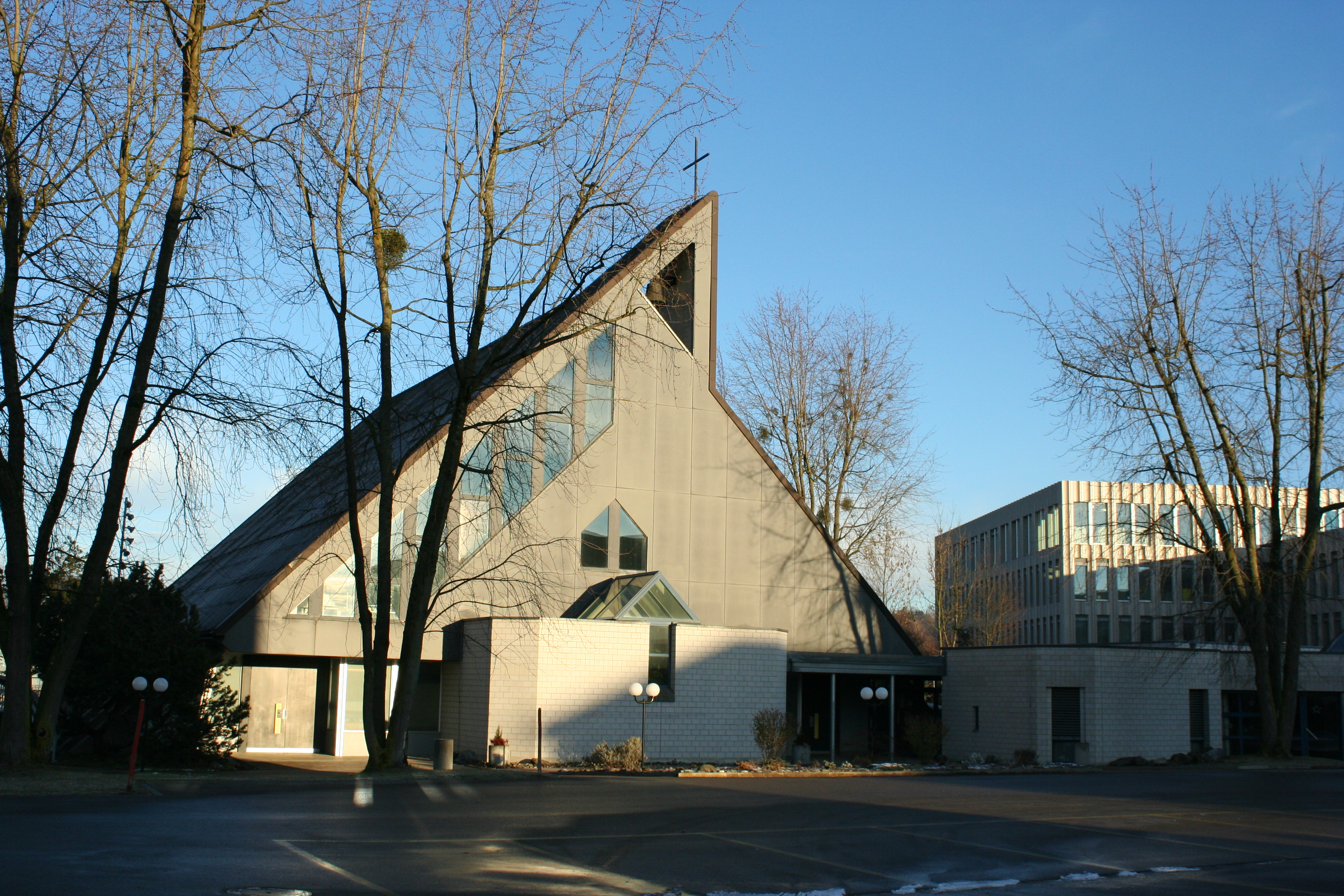 Römisch-katholische Kirche Bruder Klaus Volketswil